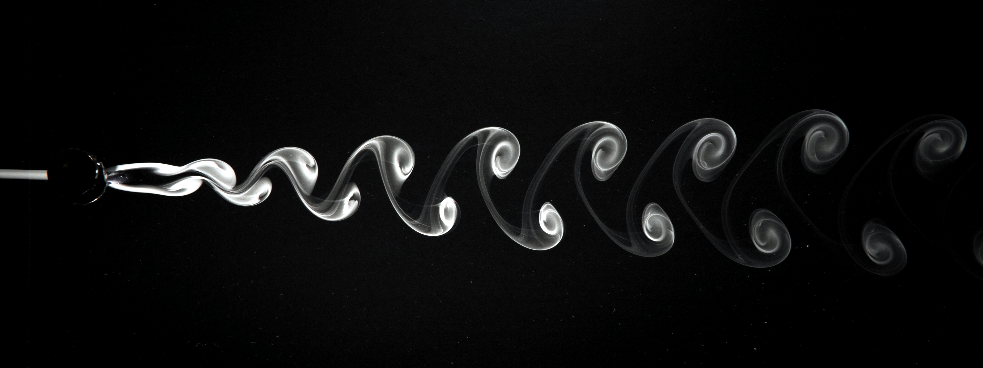 Karmansche Wirbelstraße große Reynoldszahl